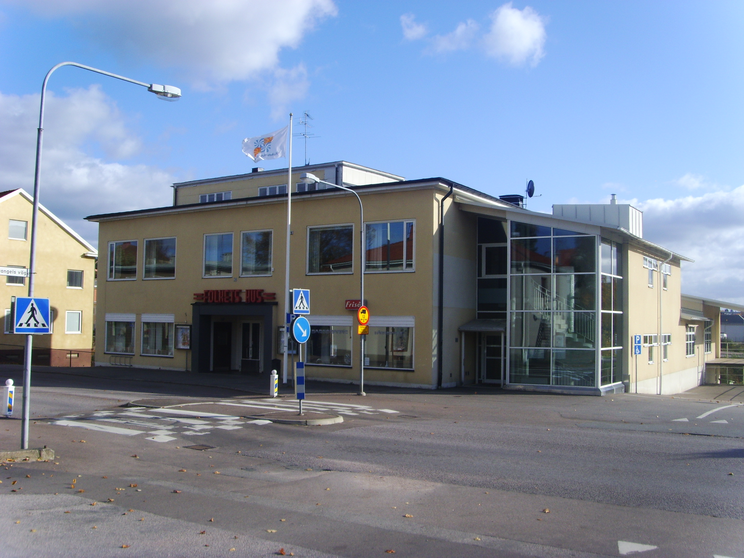 Folkets hus i Boxholm.